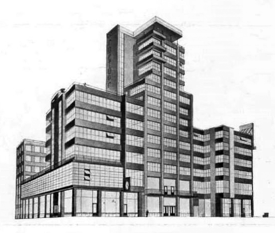 Эскиз дома Госторга на Мясницкой улице